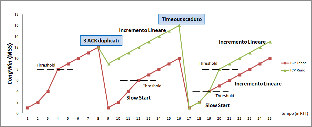 Evoluzione di CongWin in TCP Tahoe e TCP Reno